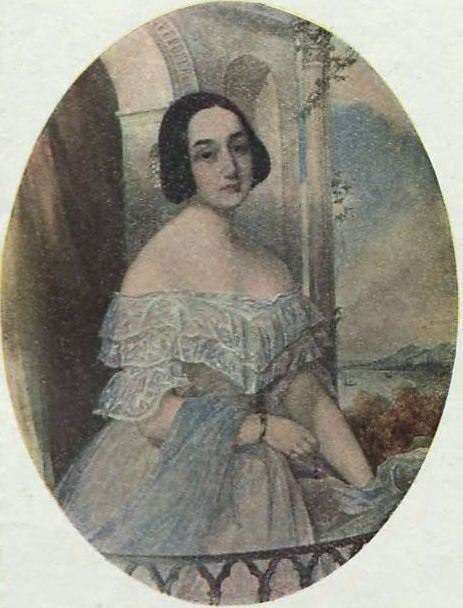 Zeneida z Hołyńskich Lubomirska (1820-1893)